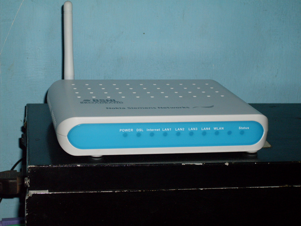 Picture of BSNL ADSL Modem